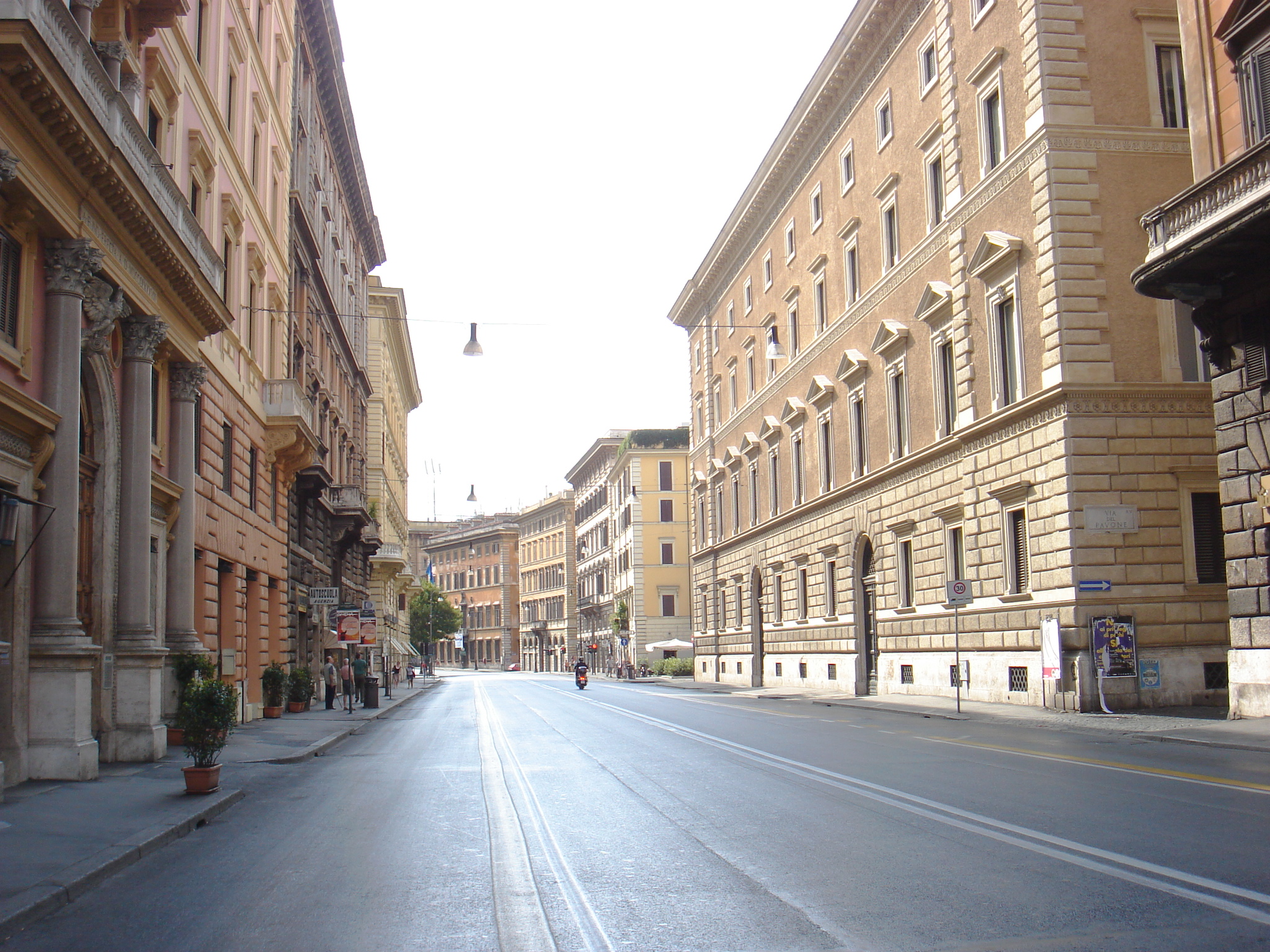 Roma, Corso Vittorio a Ferragosto. Corso Vittorio Emanuele II, 282